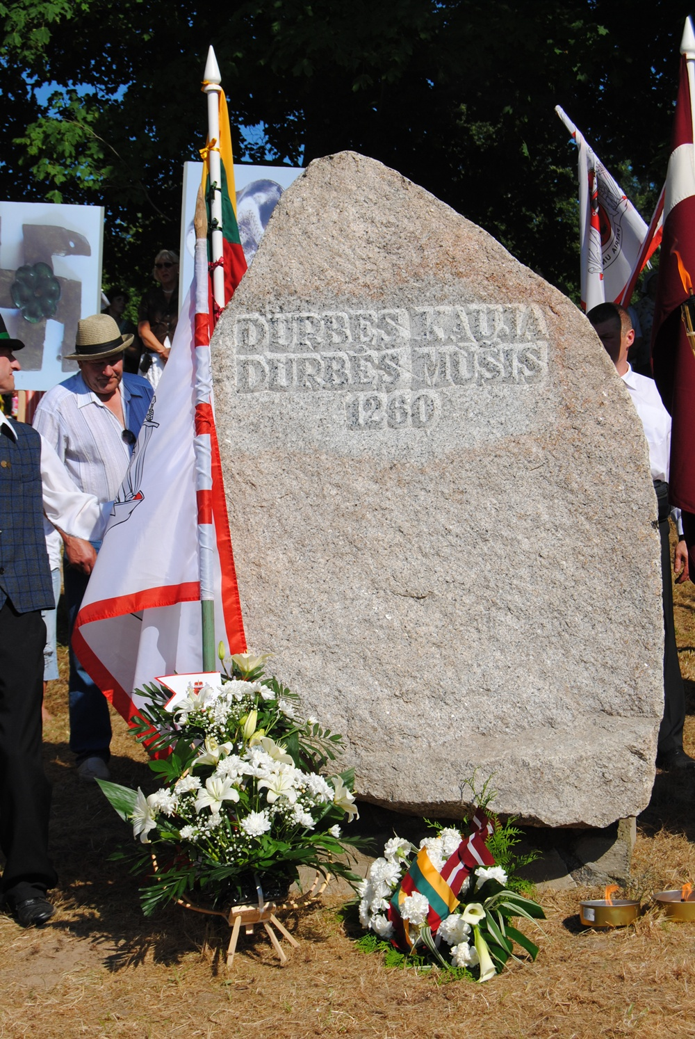 Durbes kaujas piemiņas akmens. Foto: Saeima